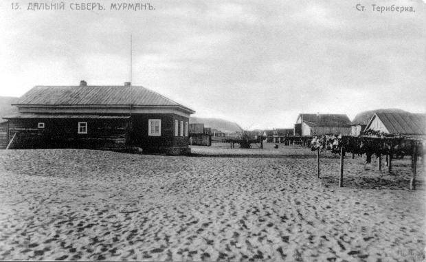 Дальний север. Мурман. Становище Териберка. Почтовая открытка, начало 1900-х годов